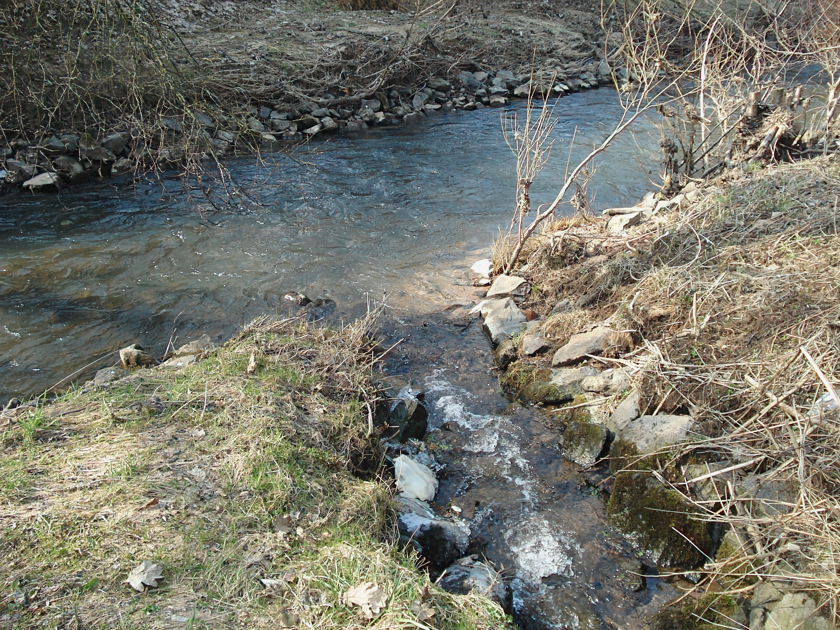 Der Oberschurbach mündet in die Kahl